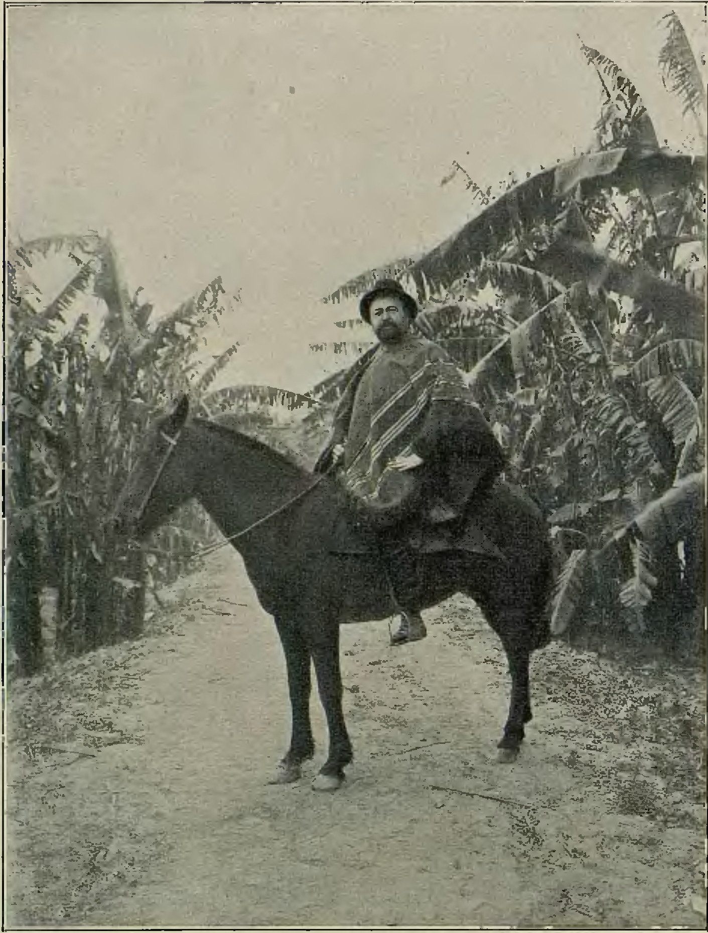 Donado a la Academia por Miguel Mancheño y Olivares. --Sello de tinta con el ex-libris de Miguel Mancheño y Olivares en la portadilla. --`This volume was digitized through a collaborative effort by La Real Academia Hispanoamericana de Ciencias, Artes y Letras and the Joseph P. Healey Library at the University of Massachusetts Boston` Este tomo fue digitalizado gracias a la generosidad de la Real Academia Hispanoamericana de Ciencias, Artes y Letras y la Bibliotecas de la Universidad de Massachusetts Boston por mutuo acuerdo para fomenter la investigacion y el desarrollo del conocimiento y las letras --Palau,30675 --Encuadernación en piel con el escudo de la República Argentina en relieve ocupando todo el plano superior y en el centro, el título en letras doradas ; el nombre del autor en el ángulo inferior derecho de la cibierta. En el plano inferior, plancha dorada en el centro con el escudo de La Argentina. Guardas en papel litrografiado con una rueda dorada --Fotografías en blanco y negro y en color, a plana entera e intercaladas en el texto --Mapa general de la República Argentina